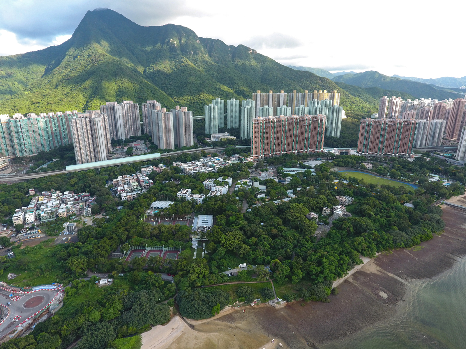 Wu Kwai Sha Youth Village